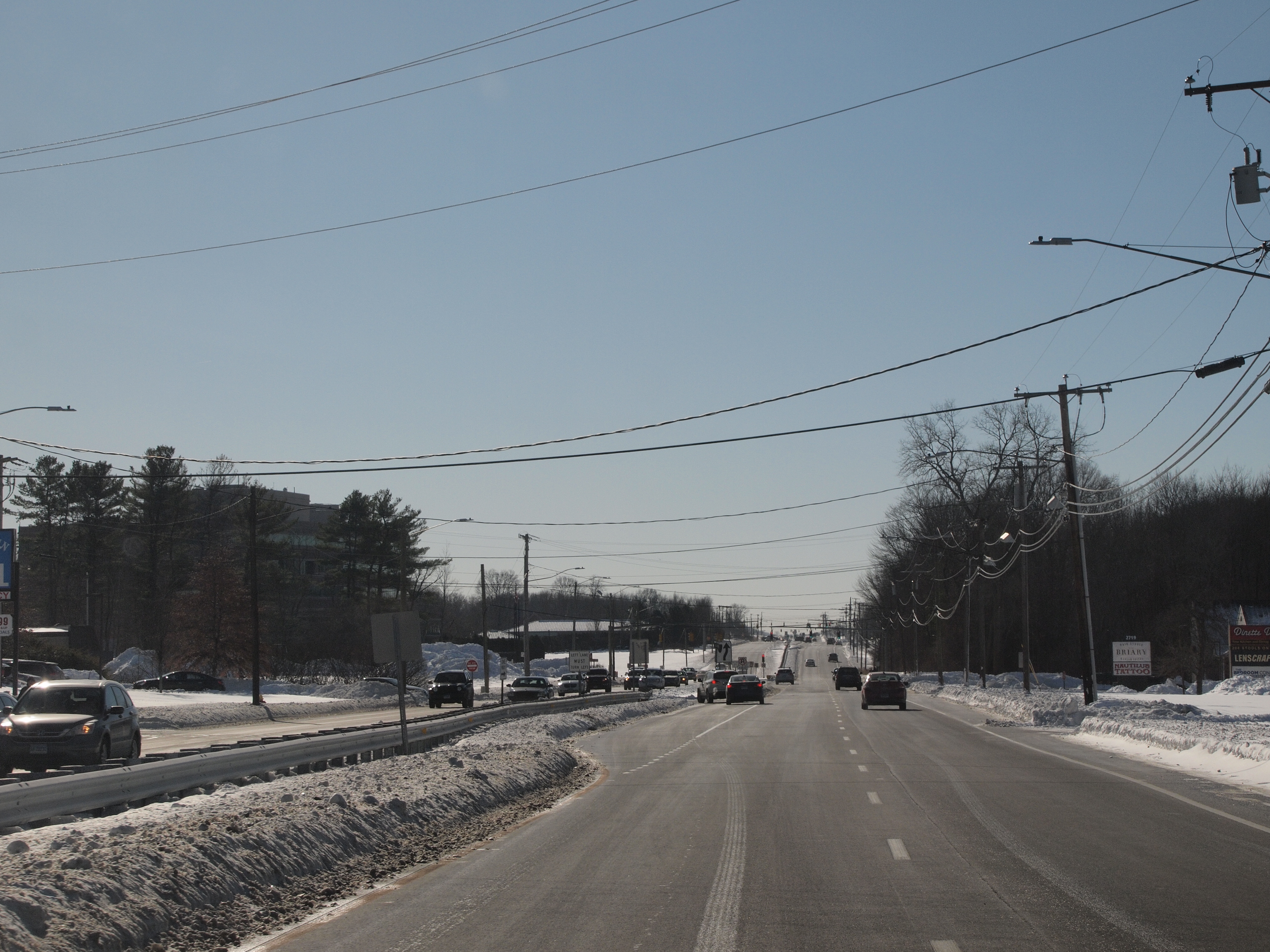 Berlin Turnpike Du darfst die Beschreibung dieser Datei gerne übersetzen, präzisieren oder berichtigen. Außerdem darfst du das Bild gerne verbessern (Helligkeit, Sättigung usw.) und Annotationen hinzufügen. Sei mutig! Feel free to translate, specify or correct the description of this file. You are also welcome to improve the image (brightness, saturation, etc.) and add annotations. Be bold! Bei einer Weiterverwendung der Datei außerhalb der Wikimedia-Projekte bitte ich um eine Nachricht auf meiner Diskussionsseite. Alternativ können Sie auch direkt eine E-Mail an schicken, ich bitte um eine kurze Notiz auf meiner Diskussionsseite. Bei Verwendung in einem Print-Medium bitte ich um die Zusendung eines Belegexemplars. If you want to use the file outside of the Wikimedia projects, please leave a message on my discussion page. Alternatively, you can send an e-mail directly to , I ask for a short note on my discussion page. If used in a print medium, please send me a voucher copy. Lizenzhinweis generieren Generate license notice Die Lizenz deckt nicht die Verwendung in Sozialen Netzweken wie Facebook, Twitter oder YouTube ab. Siehe die Einschätzung der Wikimedia Foundation. The license does not cover use on social networks such as Facebook, Twitter or YouTube. See the Wikimedia Foundation's assessment.